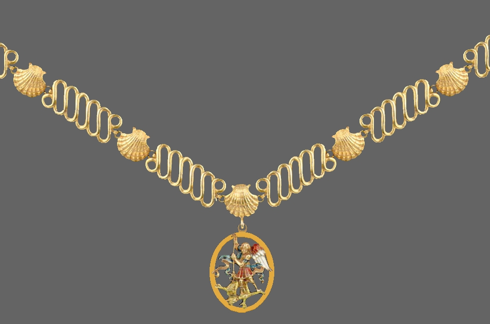 Eigen tekening